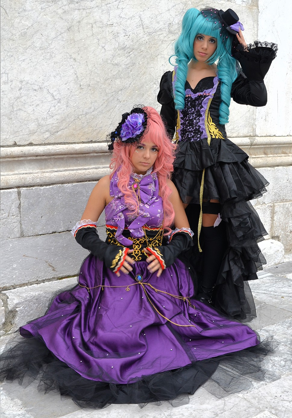 Le mie preferite